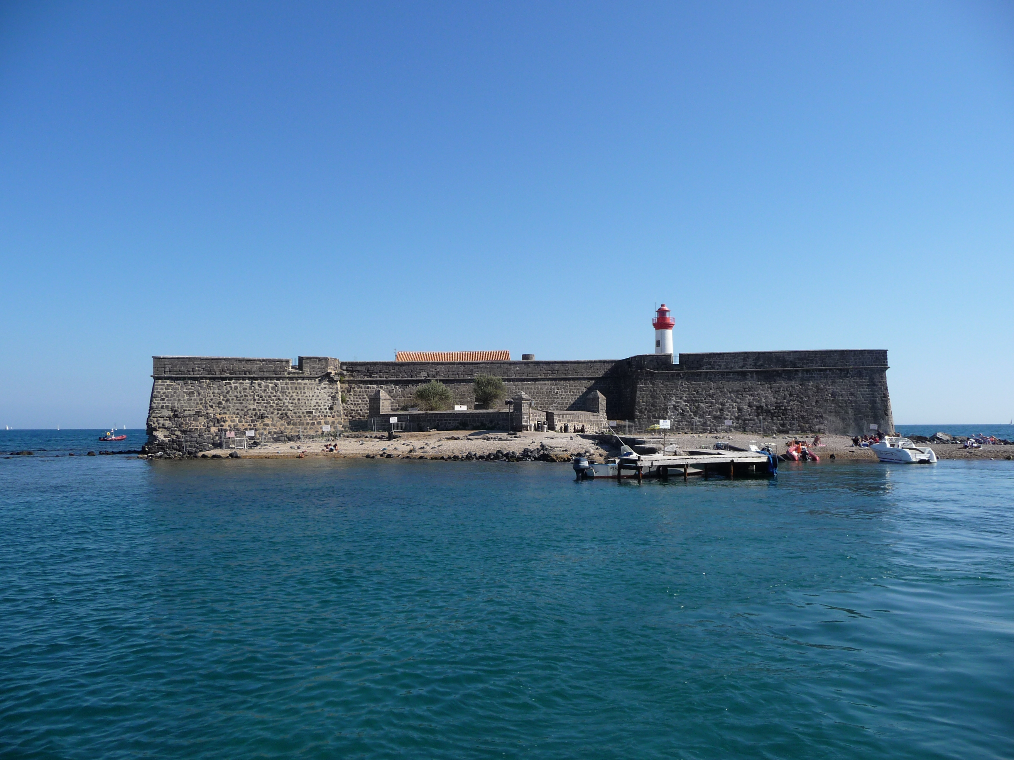 Fort Brescou, Agde (Hérault - France) côté ouest